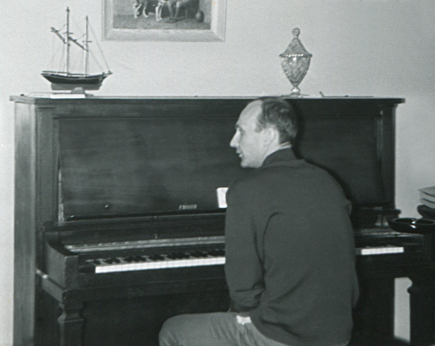 Michel Conte au piano lors d’un concert privé en 1964.